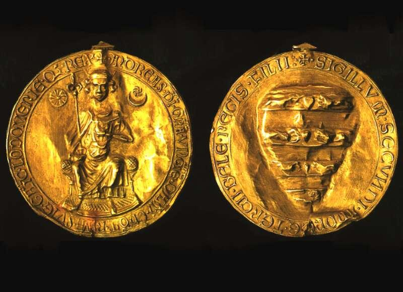 Az Aranybulla. Az aranybulla szó azt az arany pecsétet jelenti, mellyel a magyar királyok megerősítették fontosabb okmányaikat. II. András magyar király Aranybullája 1222-ből a magyar történeti alkotmány egyik legfontosabb törvényeként a megszületését követő későbbi századokban hivatkozási alap volt a rendi szabadság védelmében.